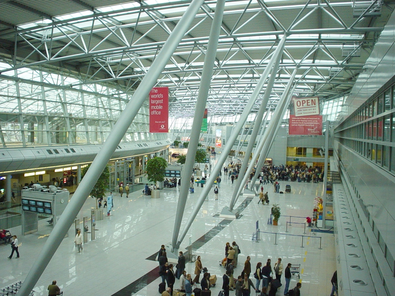 Beschreibung: Terminalgebäude Flughafen Düsseldorf International vom 18.05.2003 Quelle: Selbst fotografiert Fotograf: Alexander Nieswandt Lizenzstatus: GNU FDL 22:19, 22. Jan 2005 Alexander Nieswandt 1280 x 960 (693177 Byte) (*Beschreibung: Terminalgebäude Flughafen DÜsseldorf International vom 18.05.2003 *Fotograf: Alexander Nieswandt*Andere Versionen: (ggf. weglassen) GFDL )